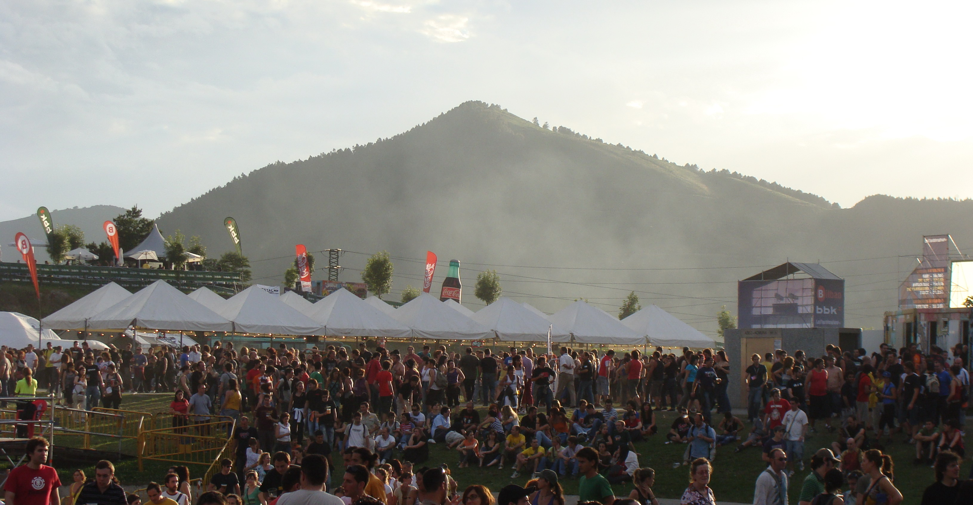 Gentío